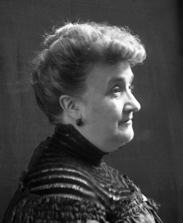 Martina Mercedes Eugenia Lucía Barros Borgoño (Santiago, 6 de julio de 1850-ibídem, 1944) fue una escritora chilena, precursora del feminismo en su país.